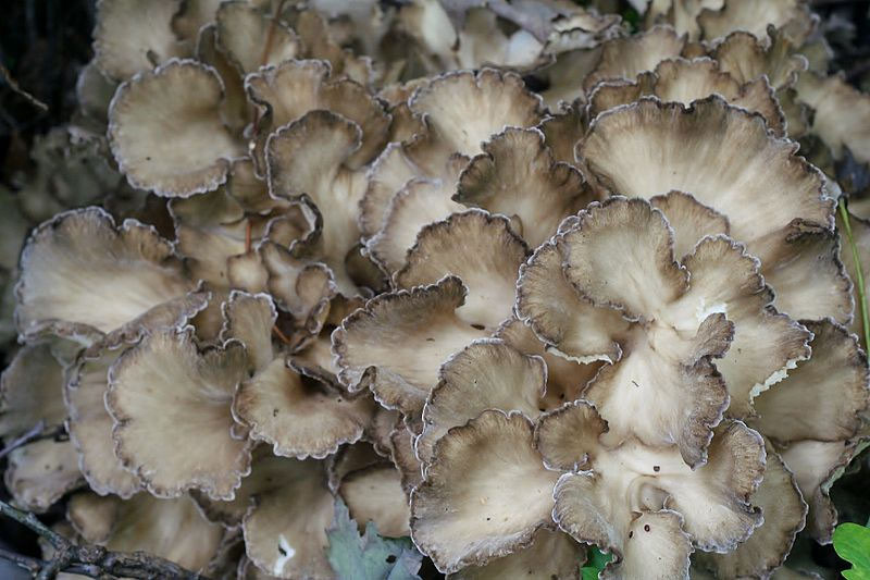 Jamur Maitake. Jamur maitake ini sangat besar dan bobotnya bisa sampai berkilo-kilo